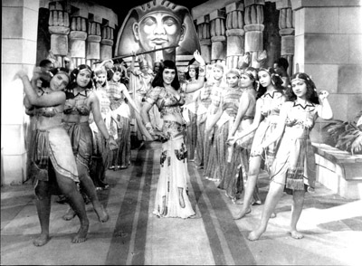 Taheya Karioca